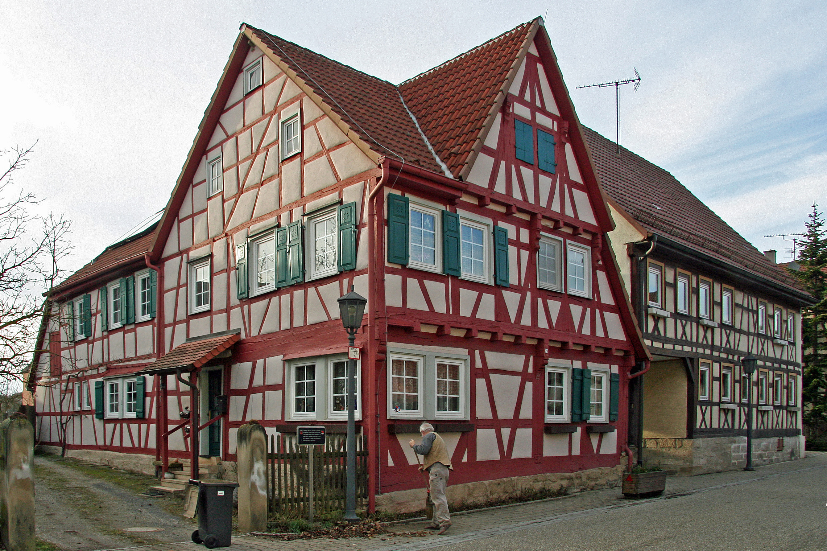 Fachwerkwohnhaus in Ochsenbach aus dem Jahr 1559